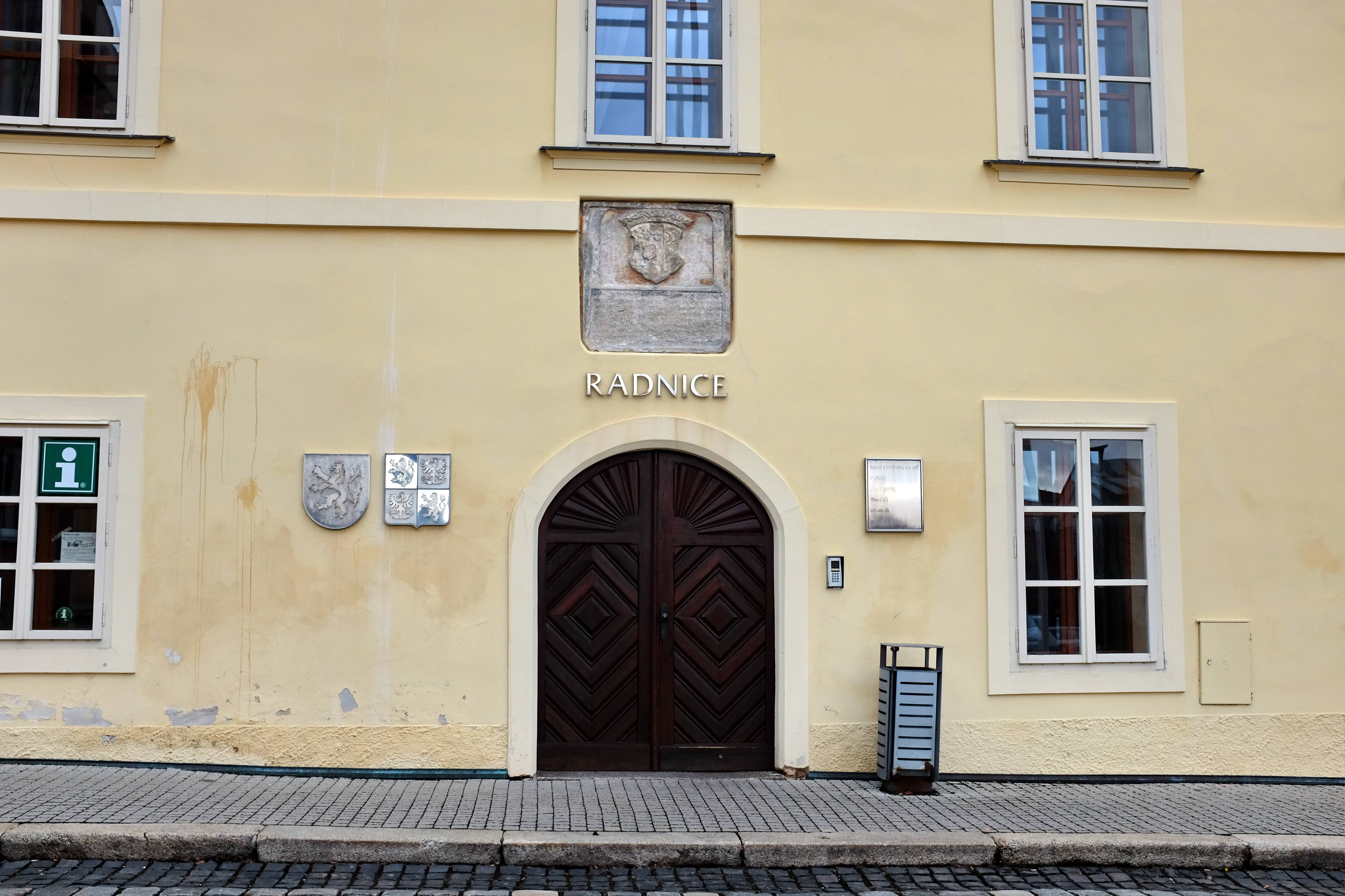 Stará radnice, Maxima Gorkého 1/16, Kynšperk nad Ohří.